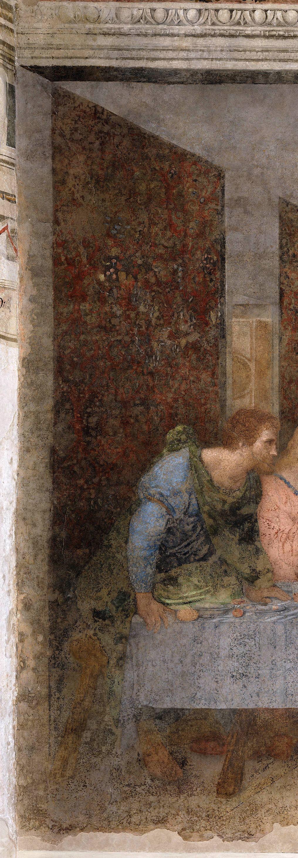 Тайная вечеря: Апостол Варфоломей